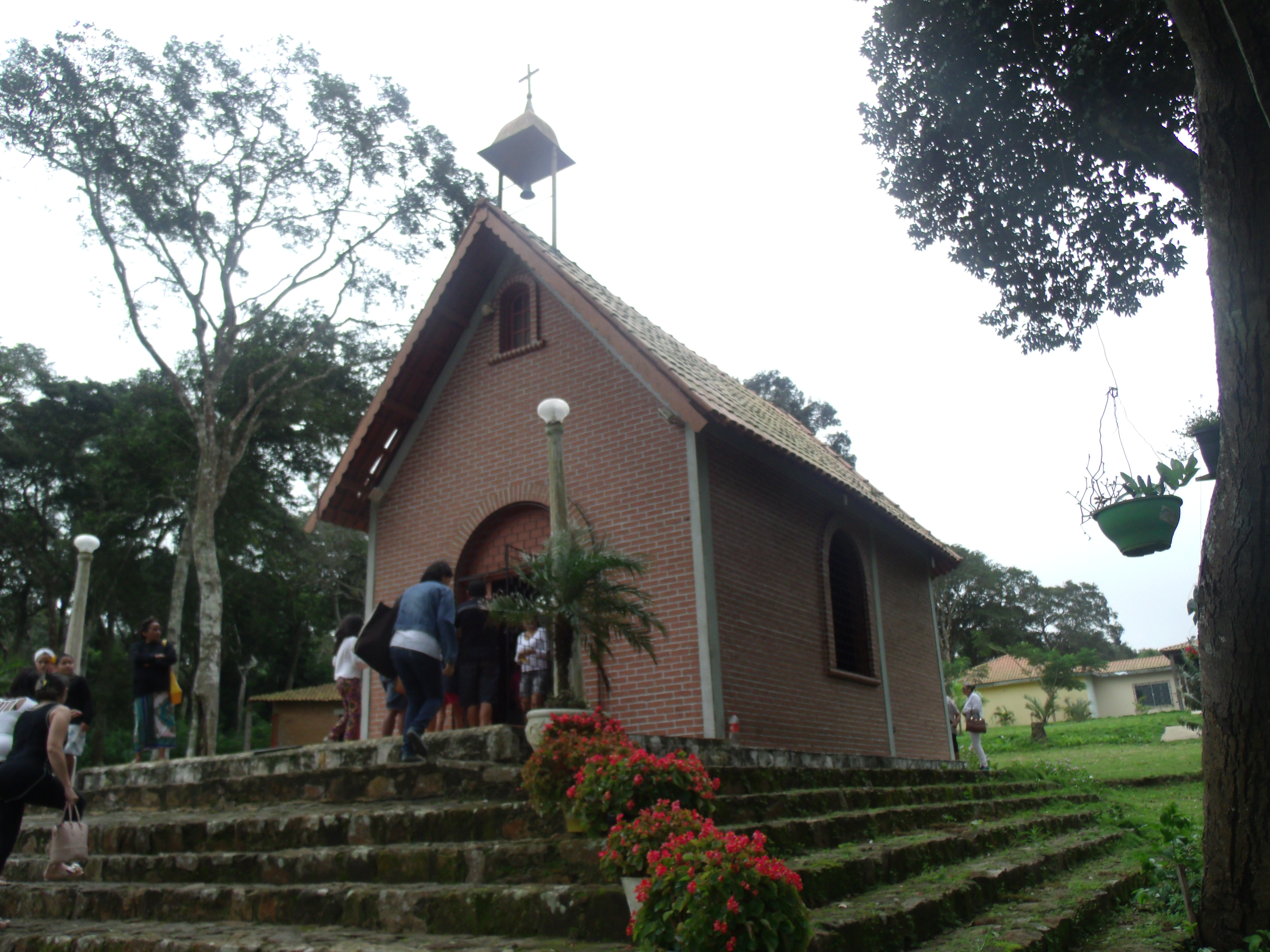 Capela do Santuário Mãe Rainha, em Ubajara, Ceará.